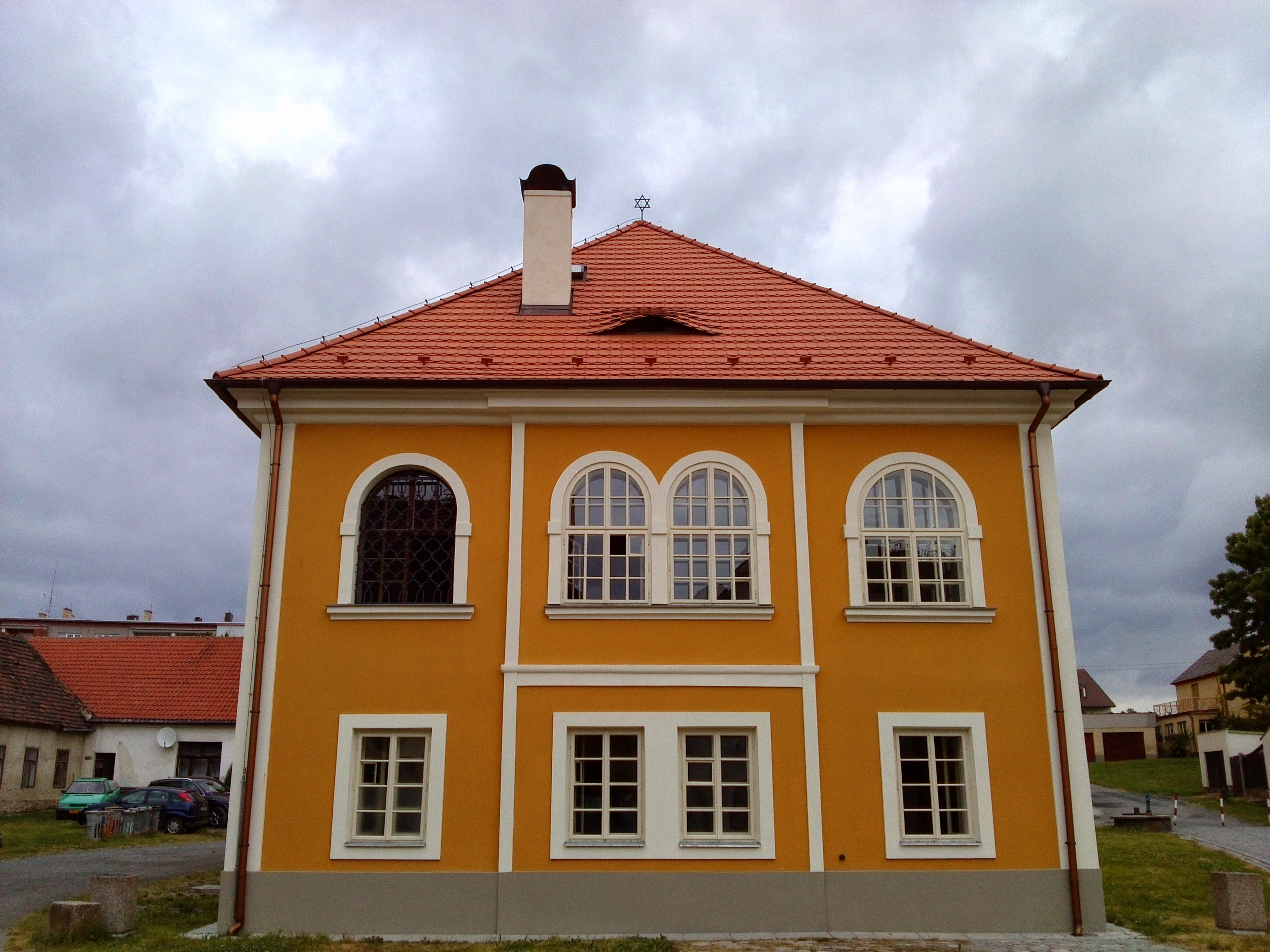 Synagoga v Březnici byla postavena v létech 1725-1726. — v Lokšany Březnice.